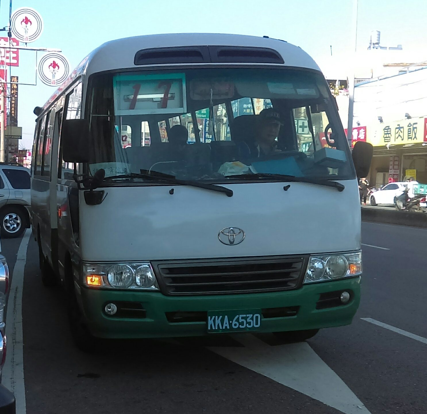 東南客運KKA-6530行駛台中市公車17路。